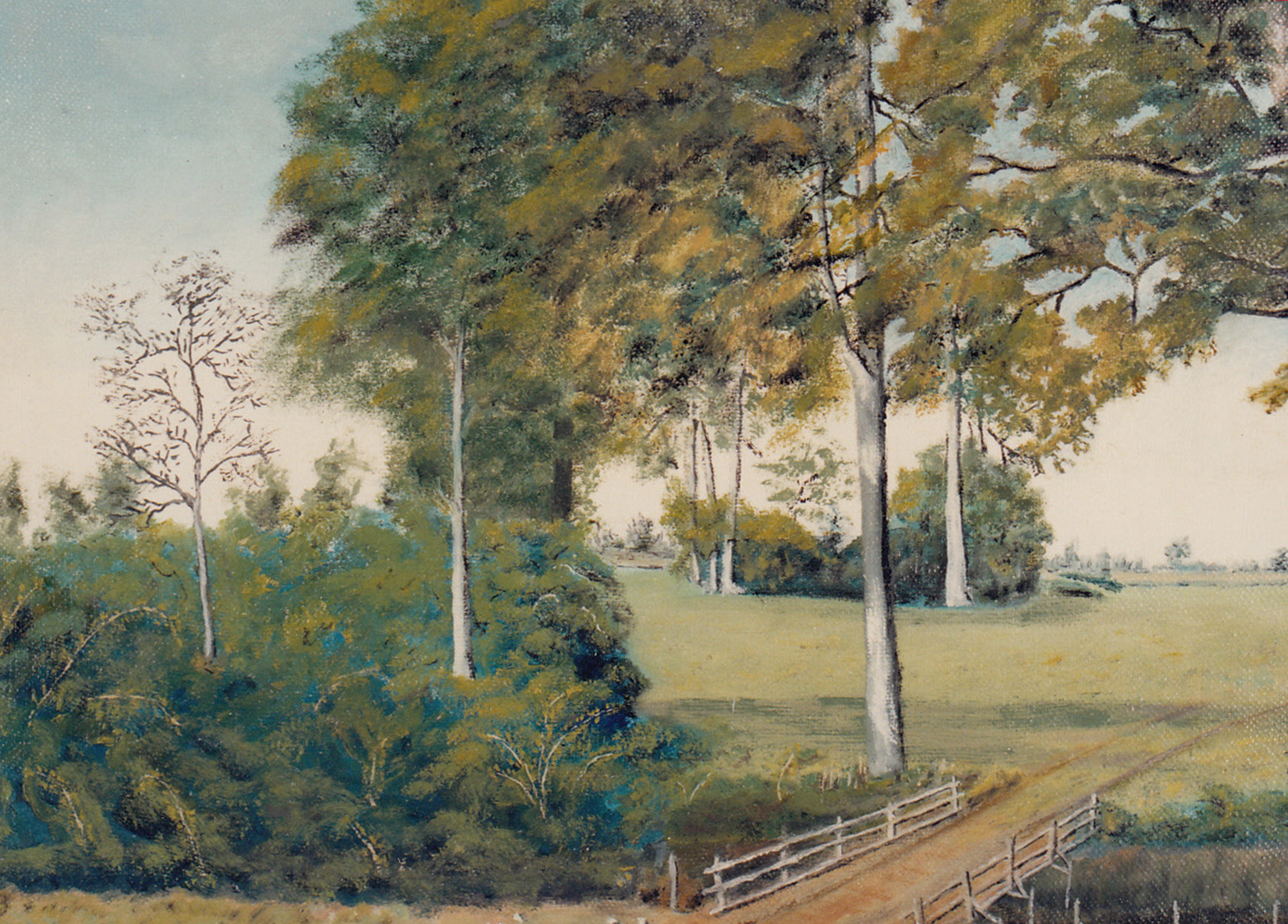 Pintura de Eugenio Cruz Vargas (1923-2014). Técnica: óleo sobre tela. Tema: puente para cruce de estero ubicado en Ayentemo, hermoso lugar en la provincia de Llanquihue, Región de Los Lagos, Chile. Medidas: 40 x 60 cm. Autora de la fotografía: Liliana Fuentes quien, por el consentimiento acreditado del propietario titular de los derechos de autor de la obra, publica esta fotografía en internet bajo la Licencia de CC BY-SA 3.0.